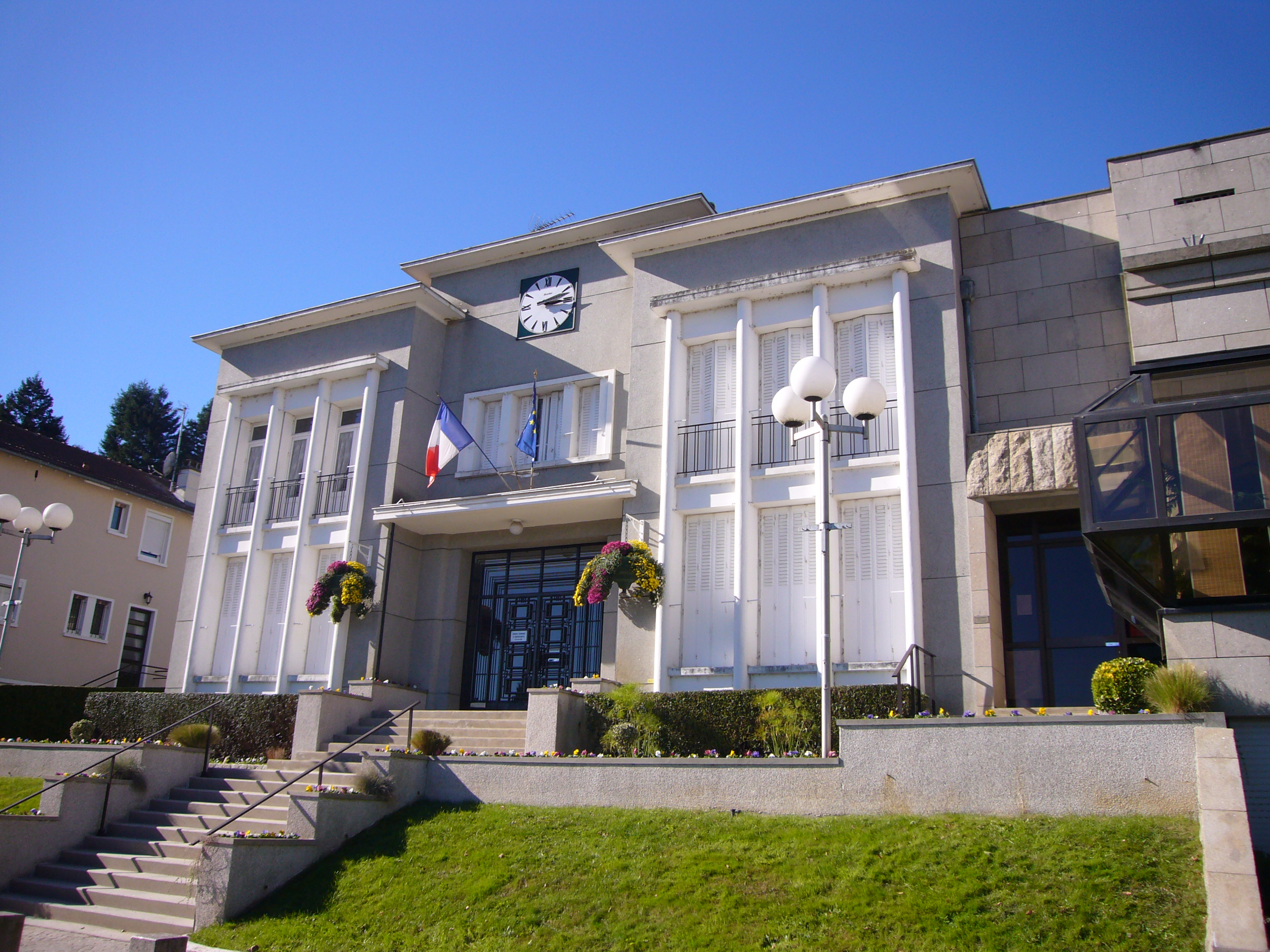 Mairie du Palais-sur-Vienne, Haute-Vienne, France